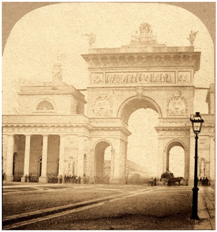 L'arco di trionfo eretto occasione della visita a Milano dell'Imperatore d'Austria Francesco Giuseppe e della consorte Elisabetta.